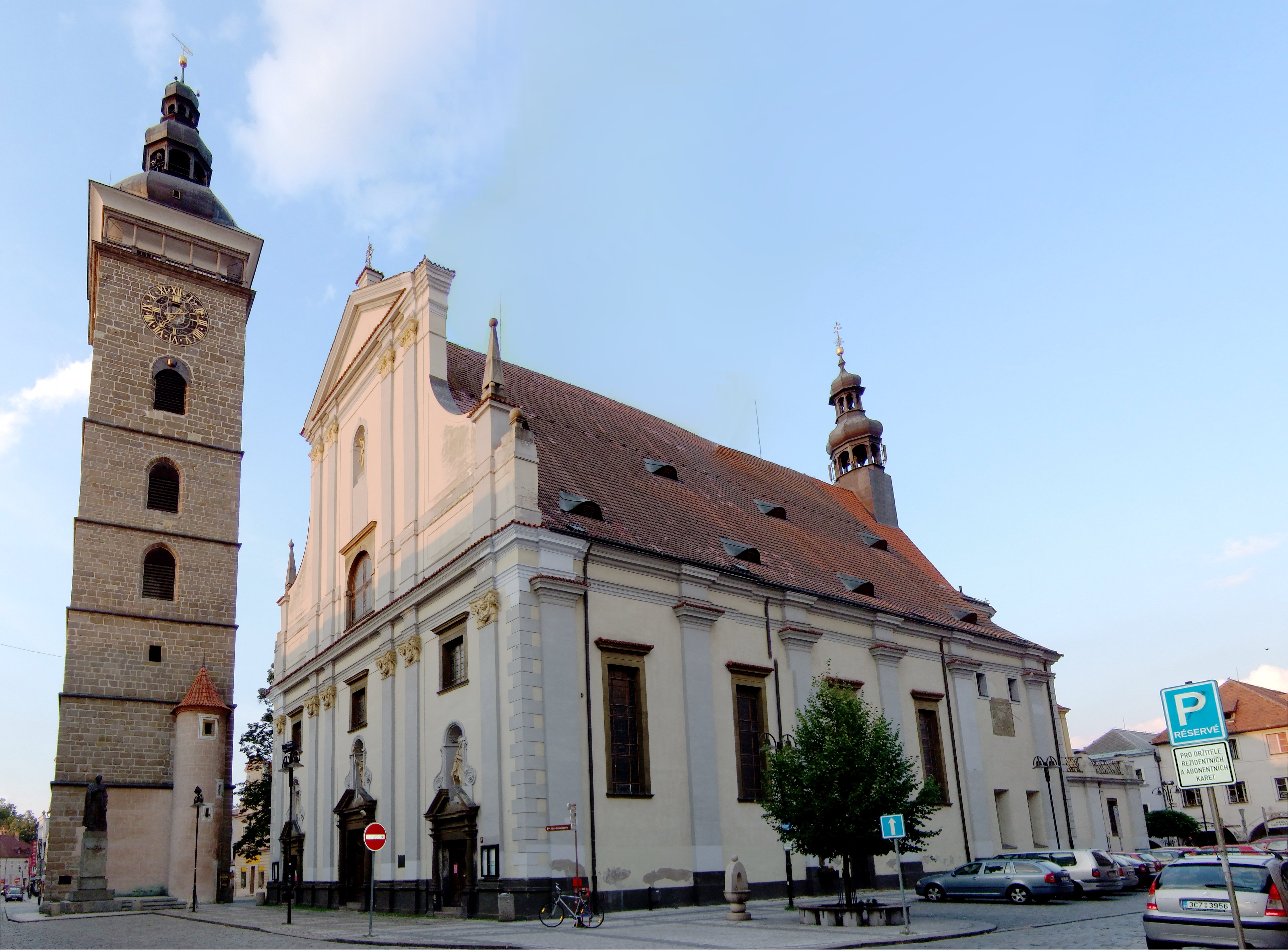 České Budějovice - Catedral